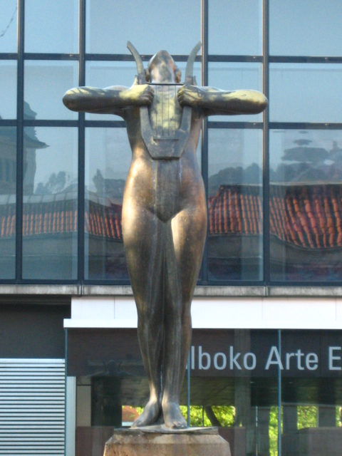 Melpómene, de Francisco Durrio de Madrón, en el Monumento a Arriaga